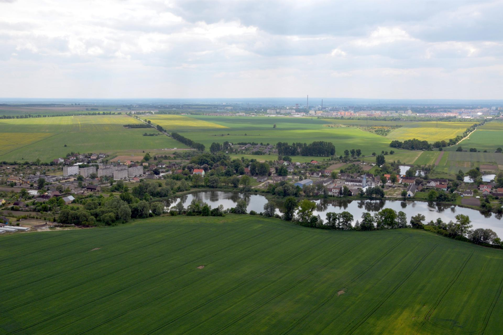 Wojcieszyce z lotu ptaka